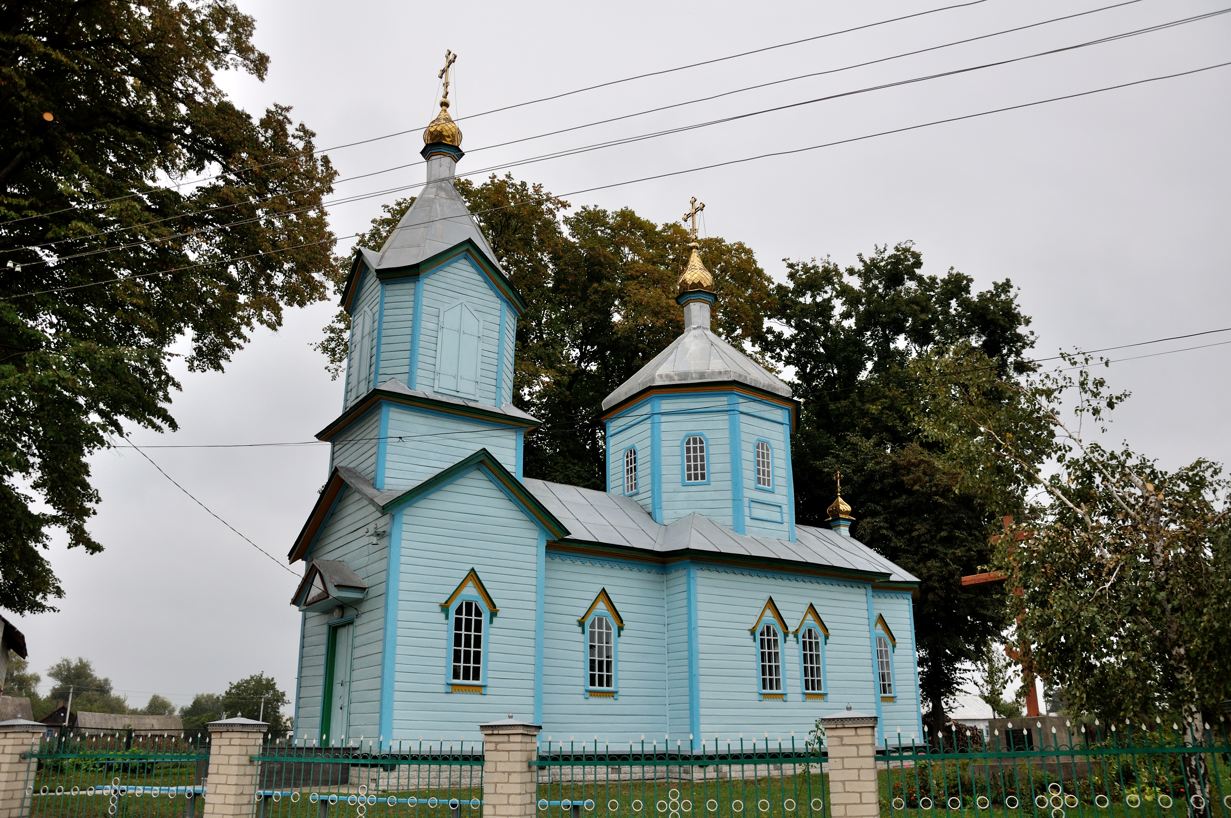 Церква Різдва Богородиці (дер.), с.Стадники